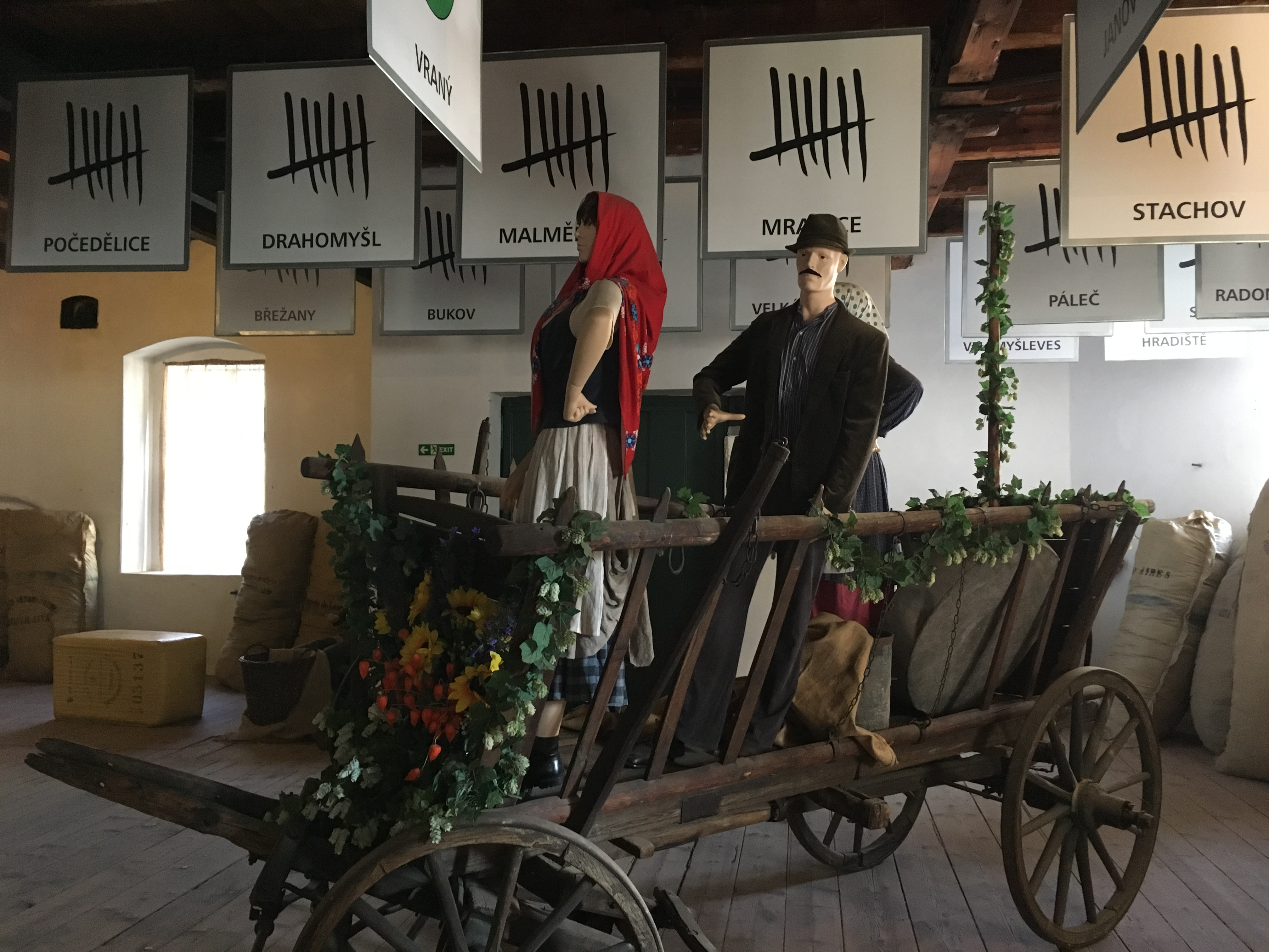 im Hopfentempel von Žatec - Wagen, Säcke, Logos